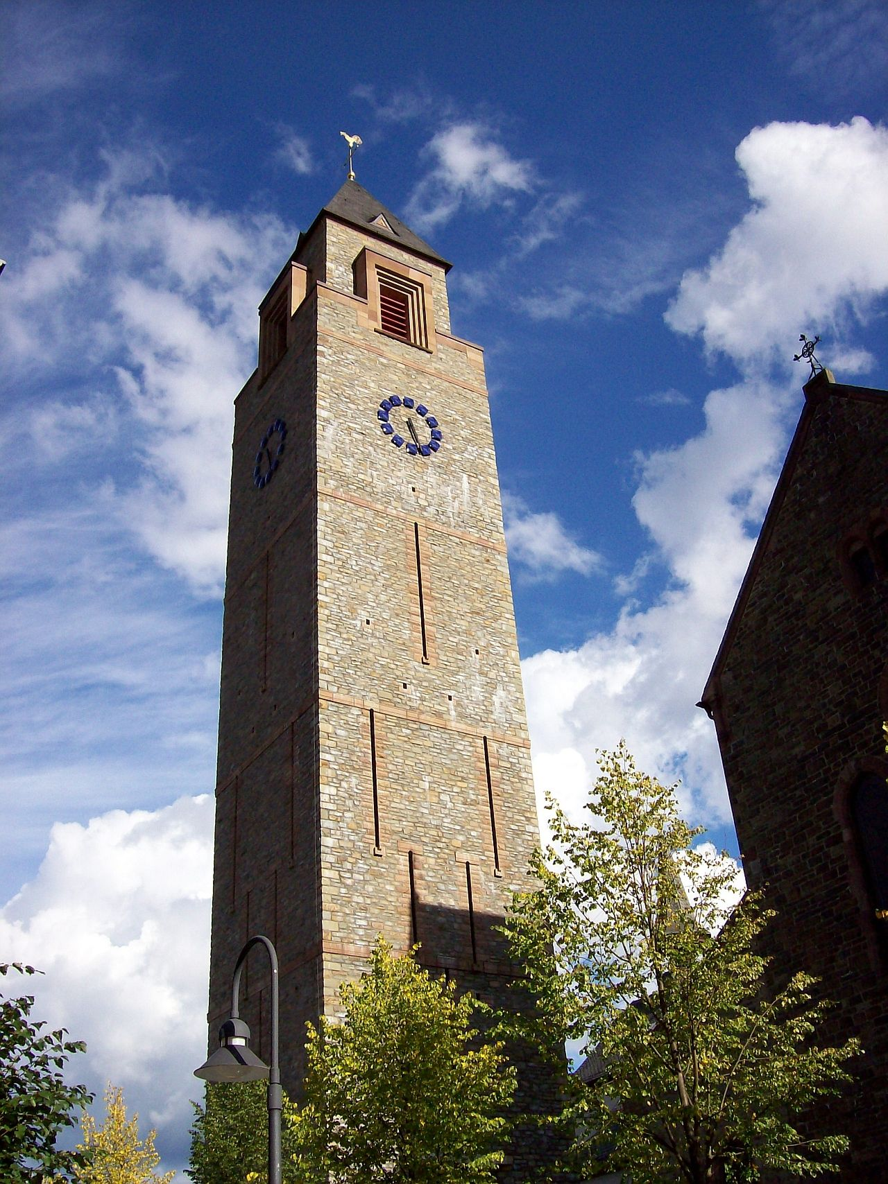 Neuer Turm, Kirche St. Alexanderm Schmallenberg (Germany)